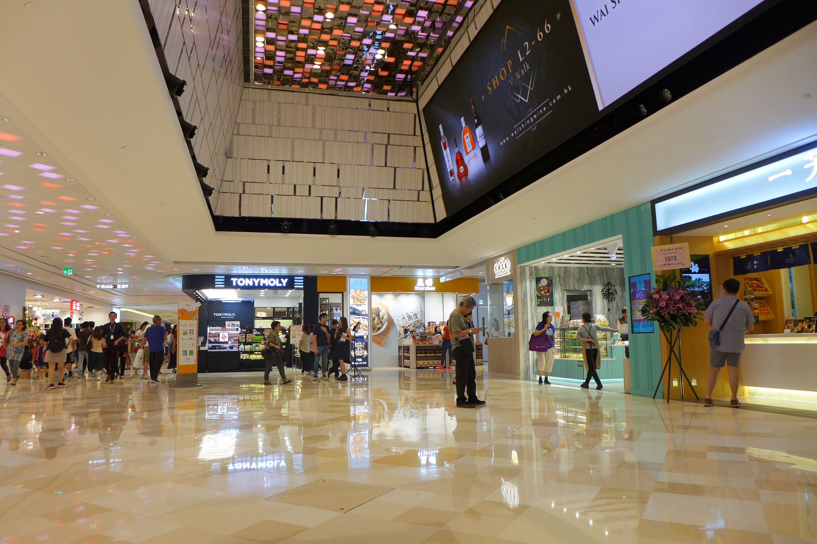 V Walk Atrium